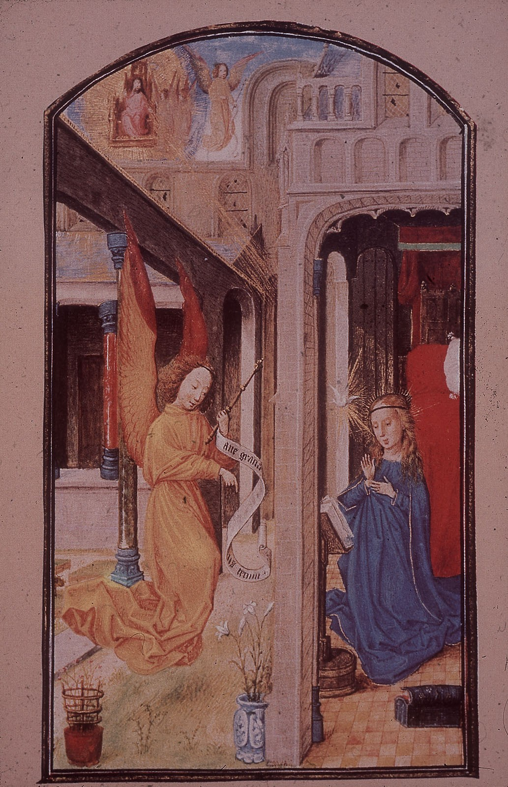 Wien, Österreichische Nationalbibliothek, cod. 1857, Stundenbuch der Maria von Burgund. In: Franz Unterkirchner (Hrsg.): Das Stundenbuch der Maria von Burgund. Codex Vindobonensis 1857 der Österreichischen Nationalbibliothek (Glanzlichter der Buchkunst), Darmstadt 1993.